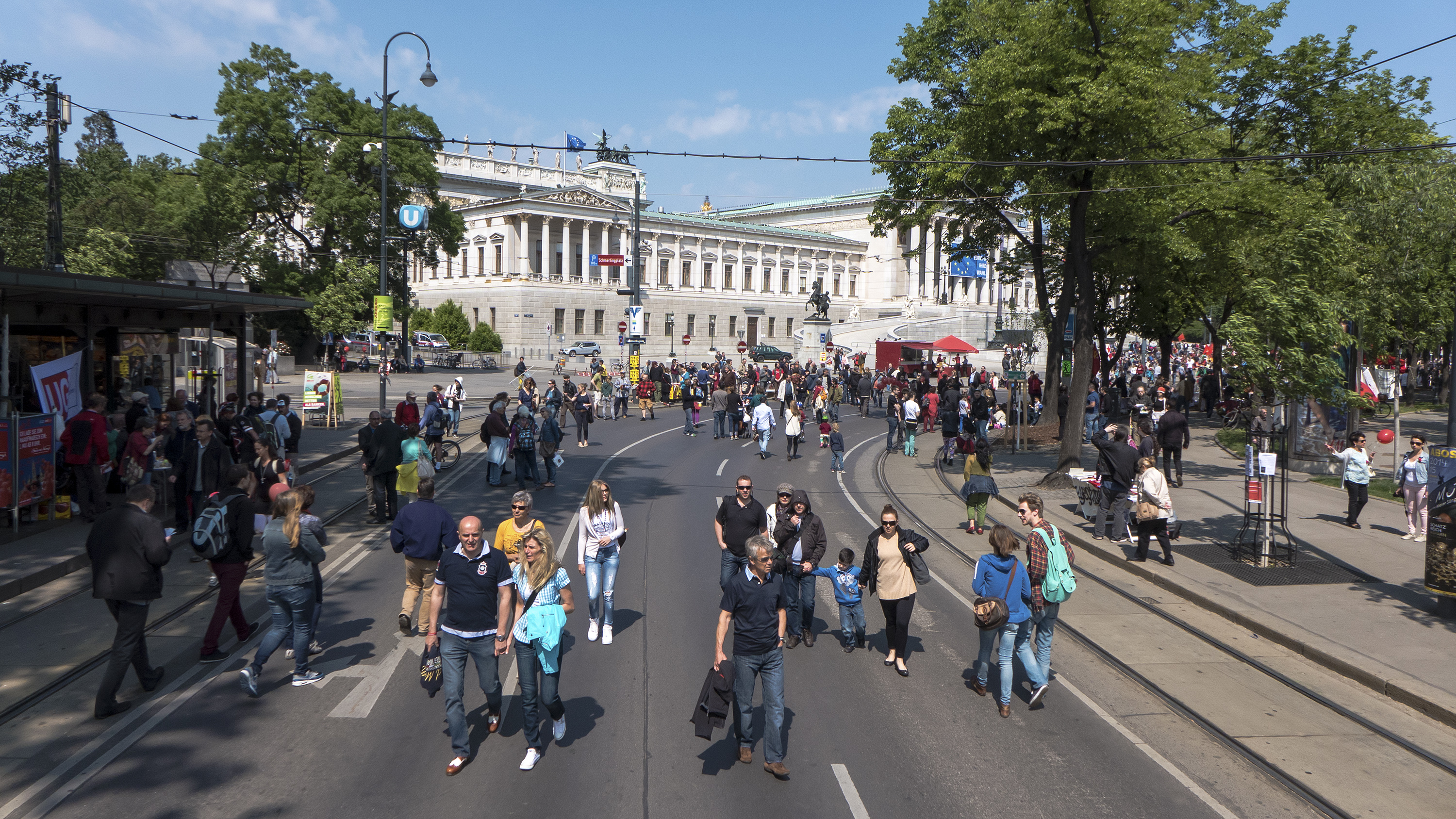 Erster Mai 2014 am Dr.-Karl-Renner-Ring in Wien 1